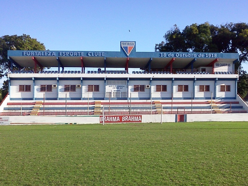 Parque dos Campeonatos